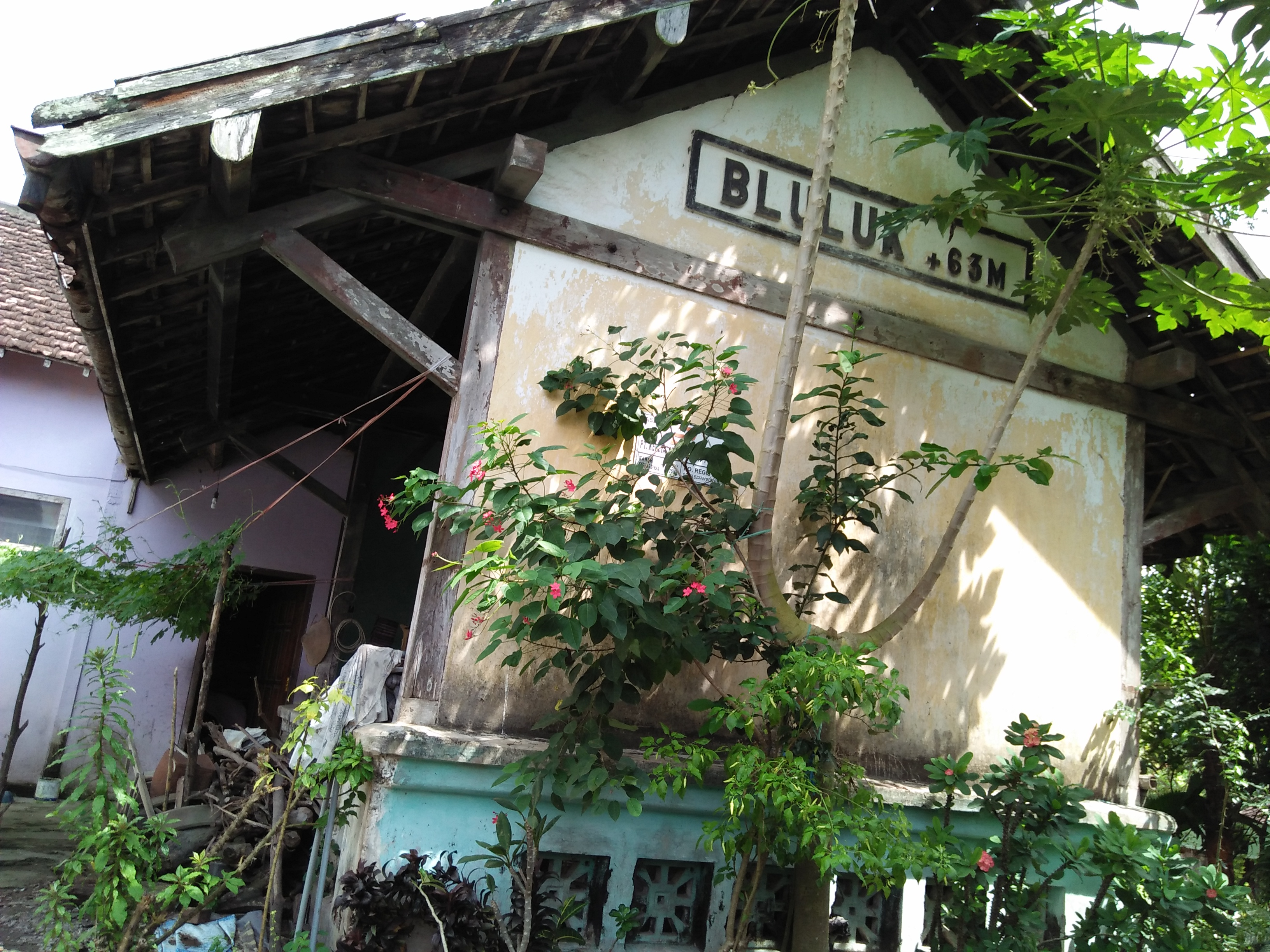 Tampak depan stasiun bluluk